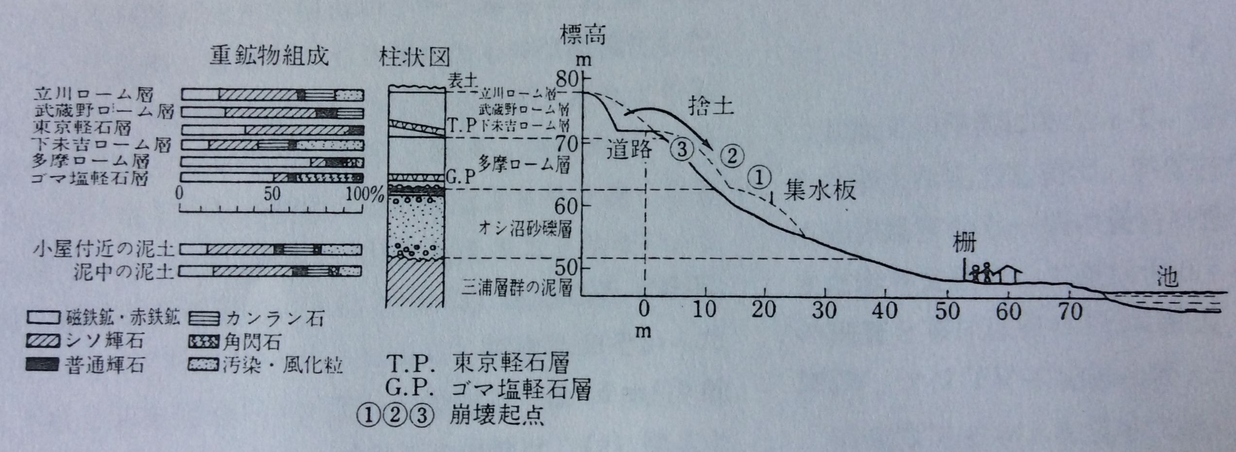 生田緑地 川崎ローム斜面崩壊実験事故